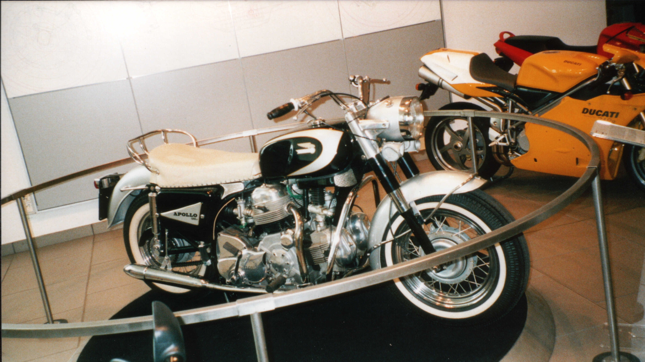 Ducati Apollo im Museo Ducati